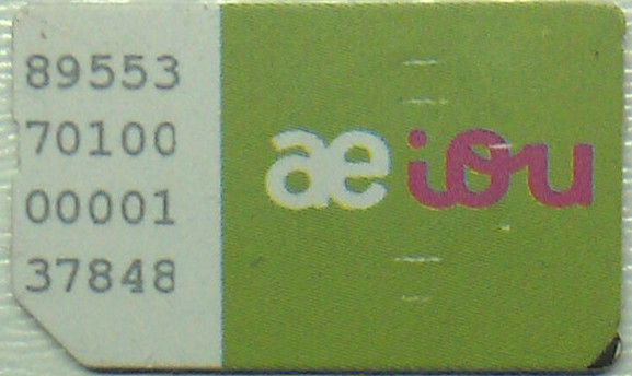 antigo SIM Card da operadora de telefonia movel aeoiu